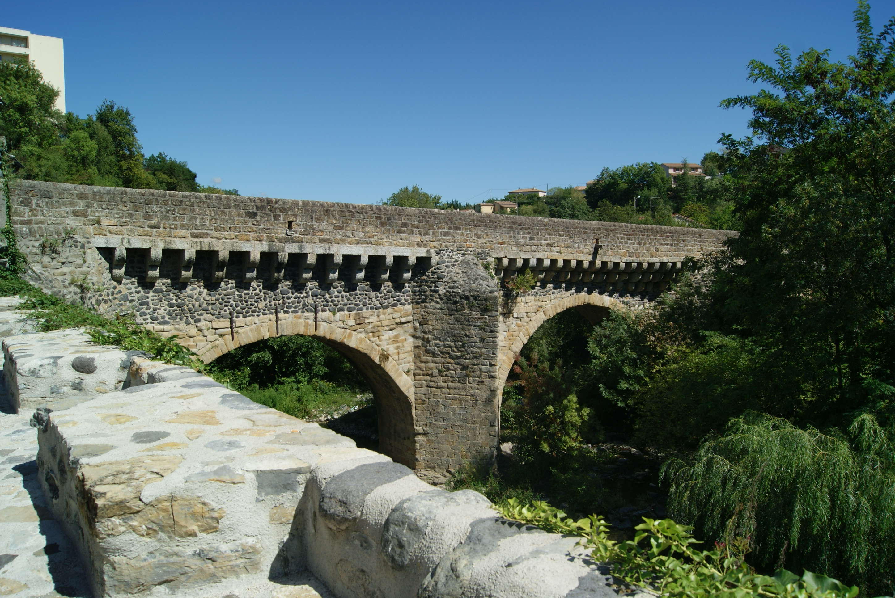 Quartier des Tanneurs